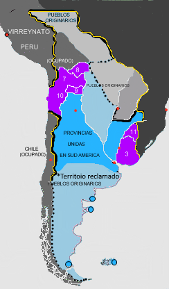 mapa historico